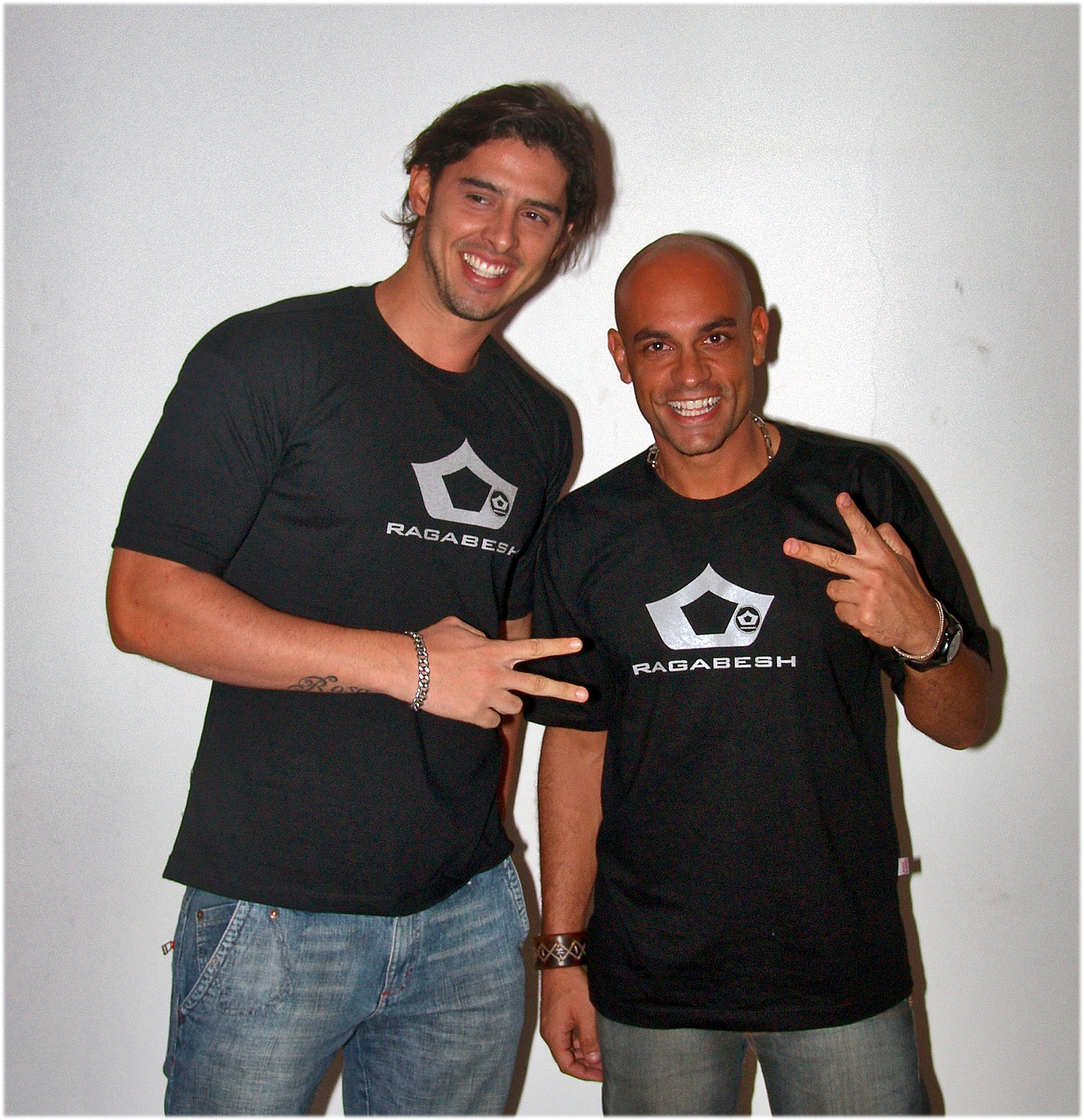 Dan Dan e Carlão do Big Brother Brasil 6.